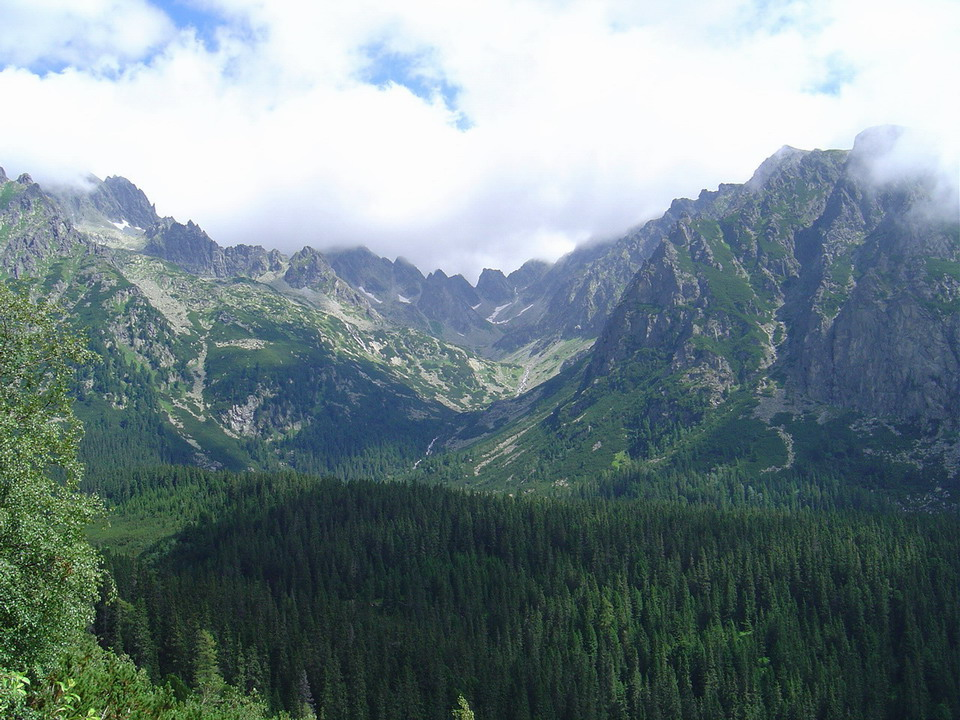 Zlomiskova dolina from Mengusovska dolina